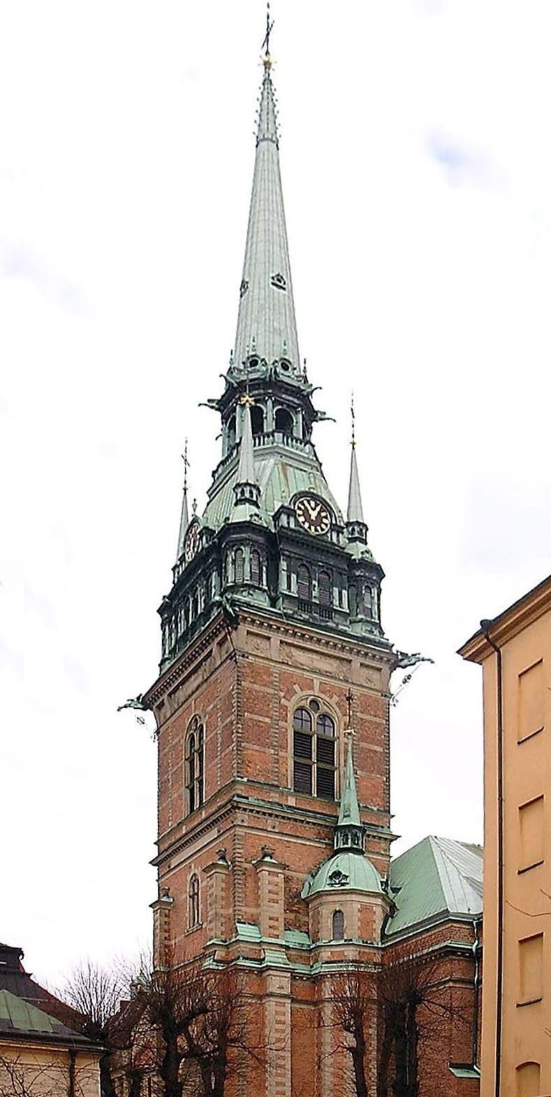 Tyska Kyrkan, Gamla stan, Stockholm. Composite of two photos.